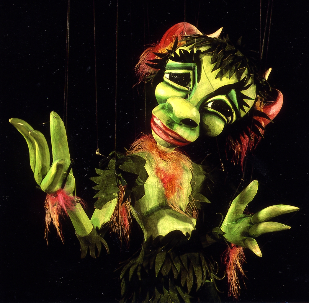 Marionette Puck aus "Ein Sommernachtstraum" von Anton Bachleitner (Düsseldorfer Marionetten-Theater)